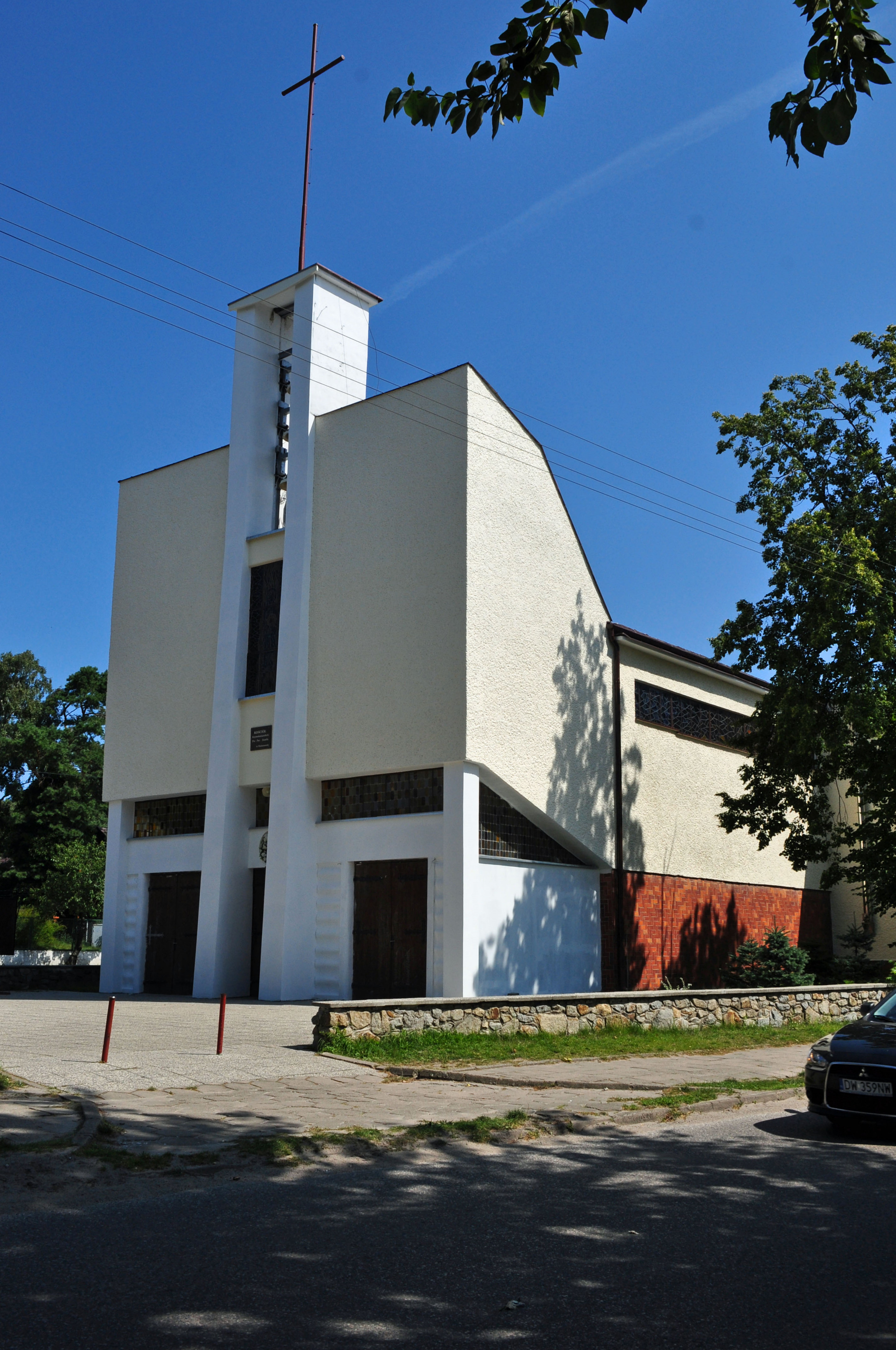 Dziwnów, ul. Kościelna 29 - rzymskokatolicki kościół parafialny p.w. św. Józefa Oblubieńca NMP